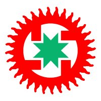 Seicho-No-Ie